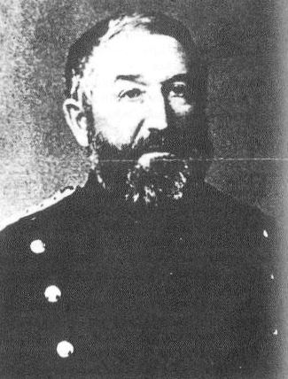 Friedrich Scharenberg (* 28. Februar 1821 in Neustrelitz; † 14. Februar 1901 in Mirow) vollständiger Name: Friedrich Christian Otto Scharenberg) war ein in Mirow tätiger Forstmann.